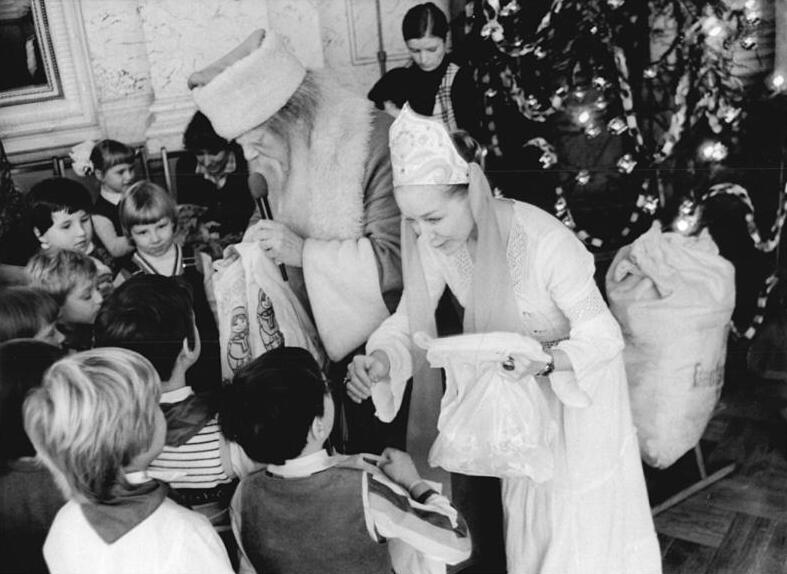 Berlin, Neujahr, Jolkafest ADN-ZB Weisflog 18-12-79 Berlin: Gemeinsam mit dem Zentralvorstand der Gesellschaft für DSF veranstaltete der Bezirksvorstand und das Zentrale Haus der DSF das 1. deutsch-sowjetische Jolka-Fest. "Väterchen Frost" und die "Schneekönigin" überreichten den ca. 200 Kindern- unter ihnen auch sowjetische Pioniere und chilenische Kinder- kleine Weihnachtsgeschenke.